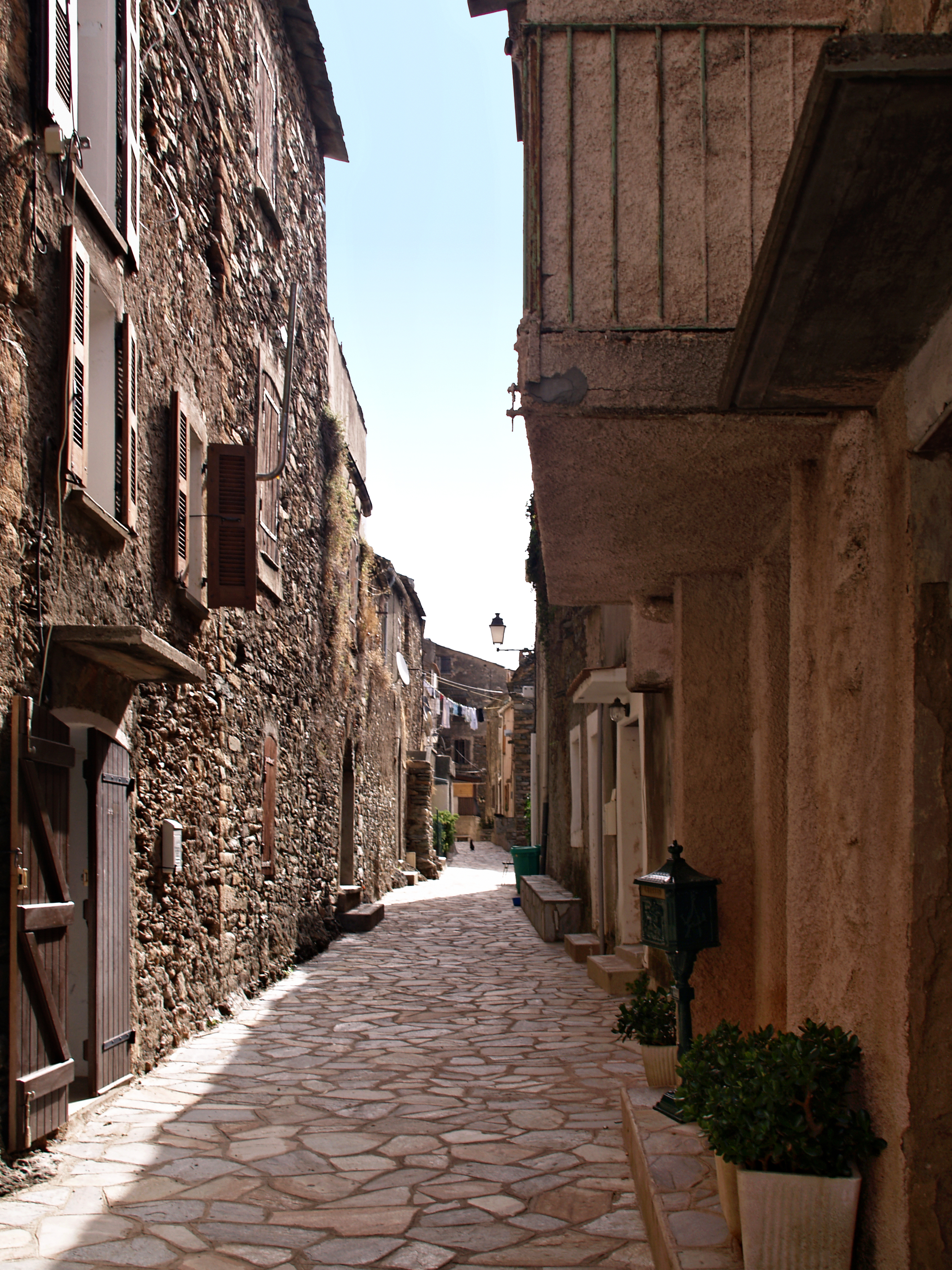 Borgo (Corse) - Ruelle du village